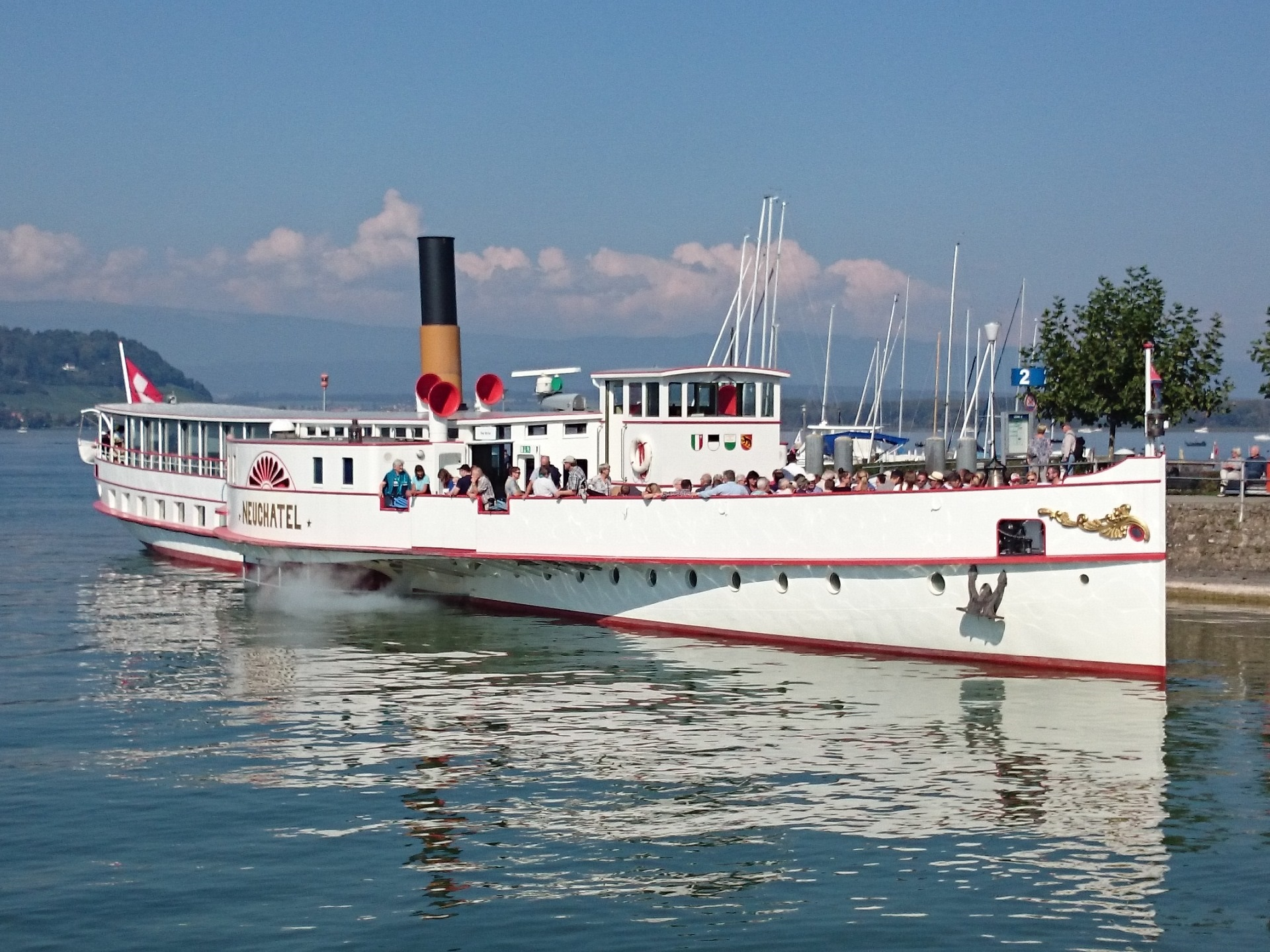 Halbsalon-Raddampfer Neuchâtel 1912 erbaut durch Escher-Wyss in Zürich im Jahre 2016 auf dem Murtenssee.